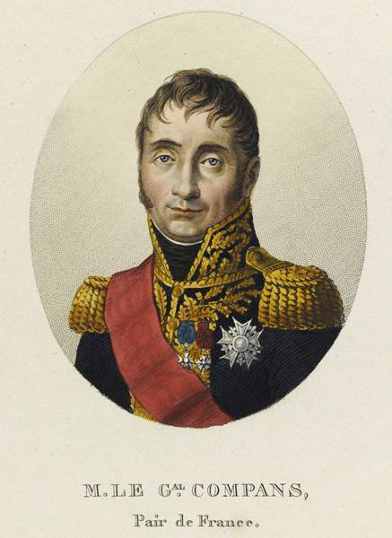 Le général Compans, pair de France